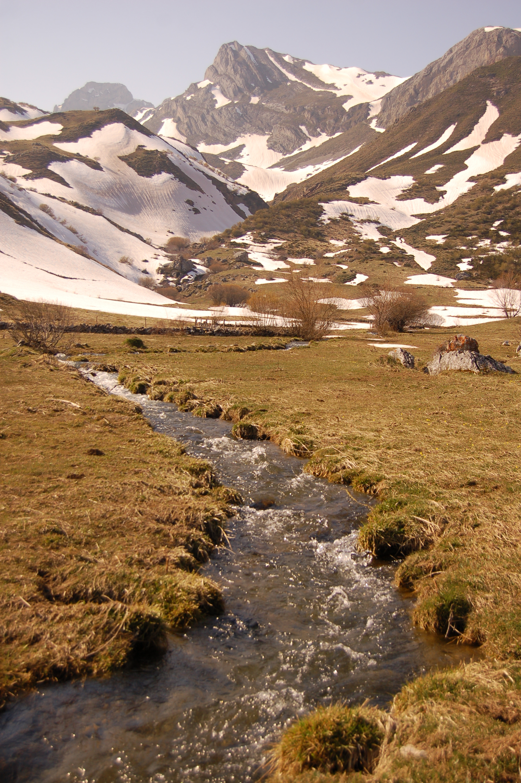 Valle de la comarca de Omaña, cerca de Omañón.